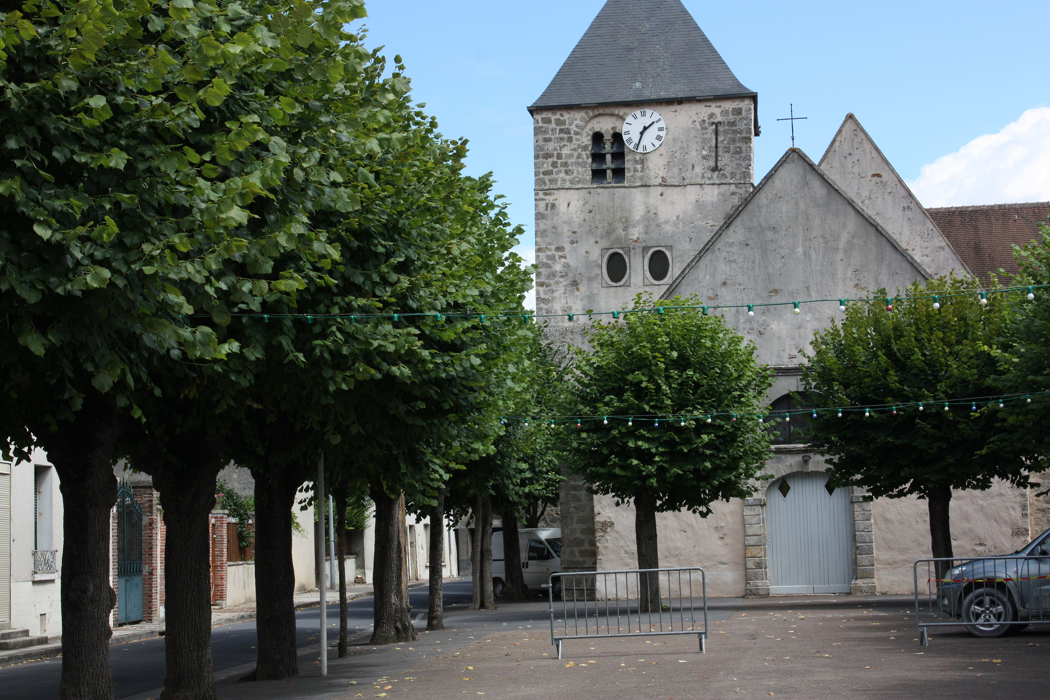 Conflans-sur-Seine - Eglise Saint-Etienne